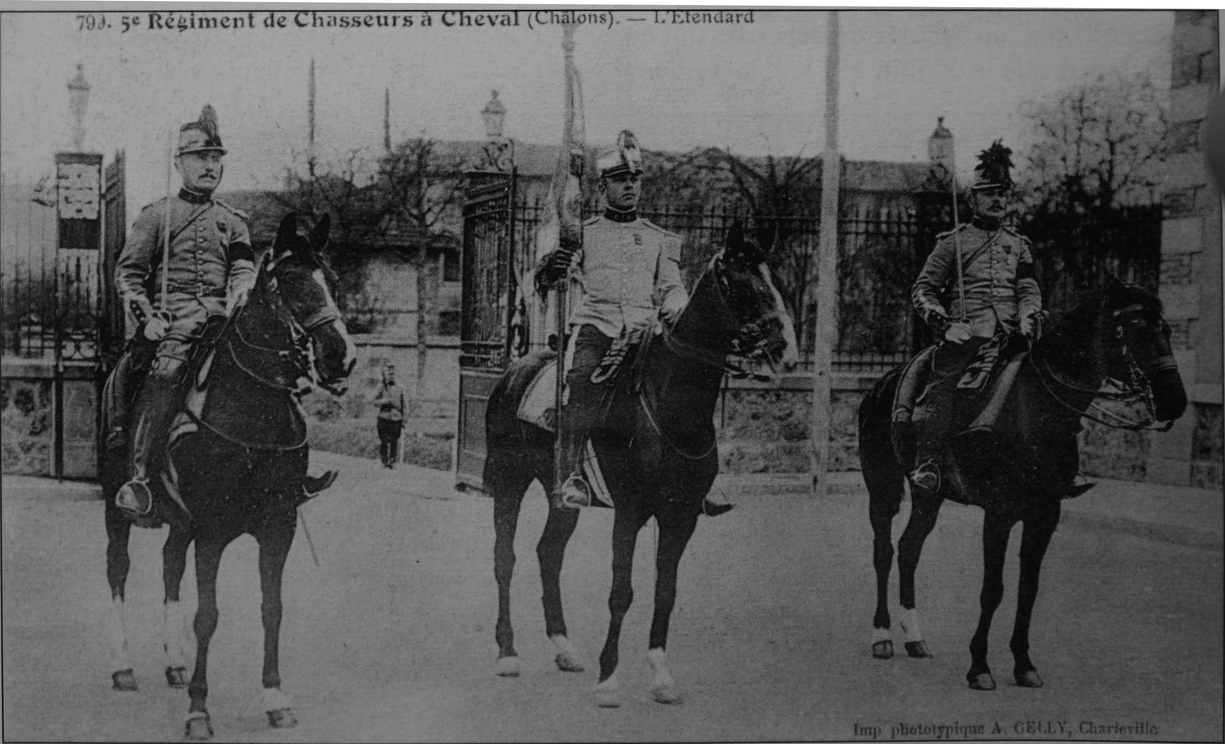 une vue de cf. titre.